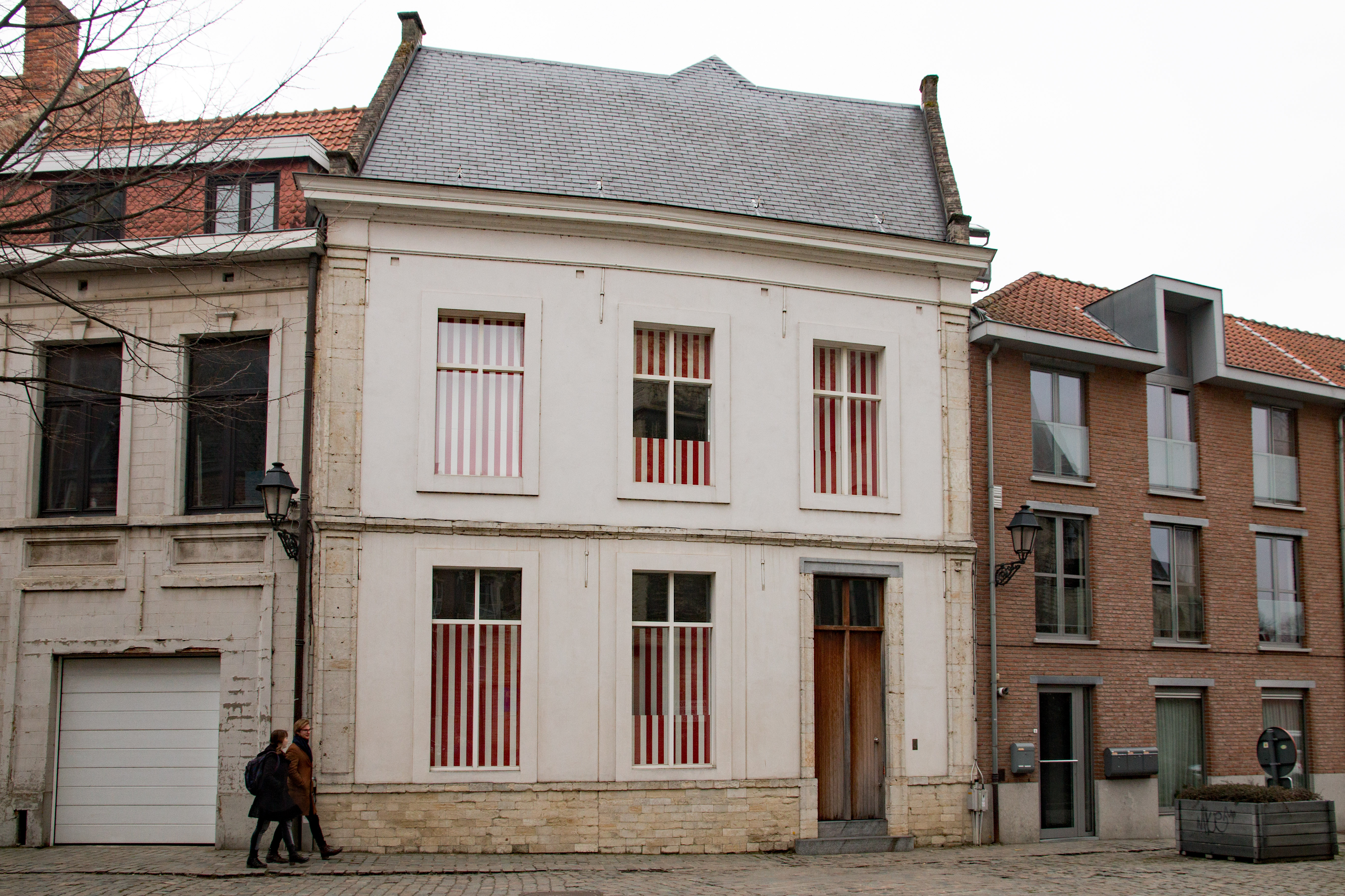 Pastorie (voormalige) van de Sint-Geertruikerk